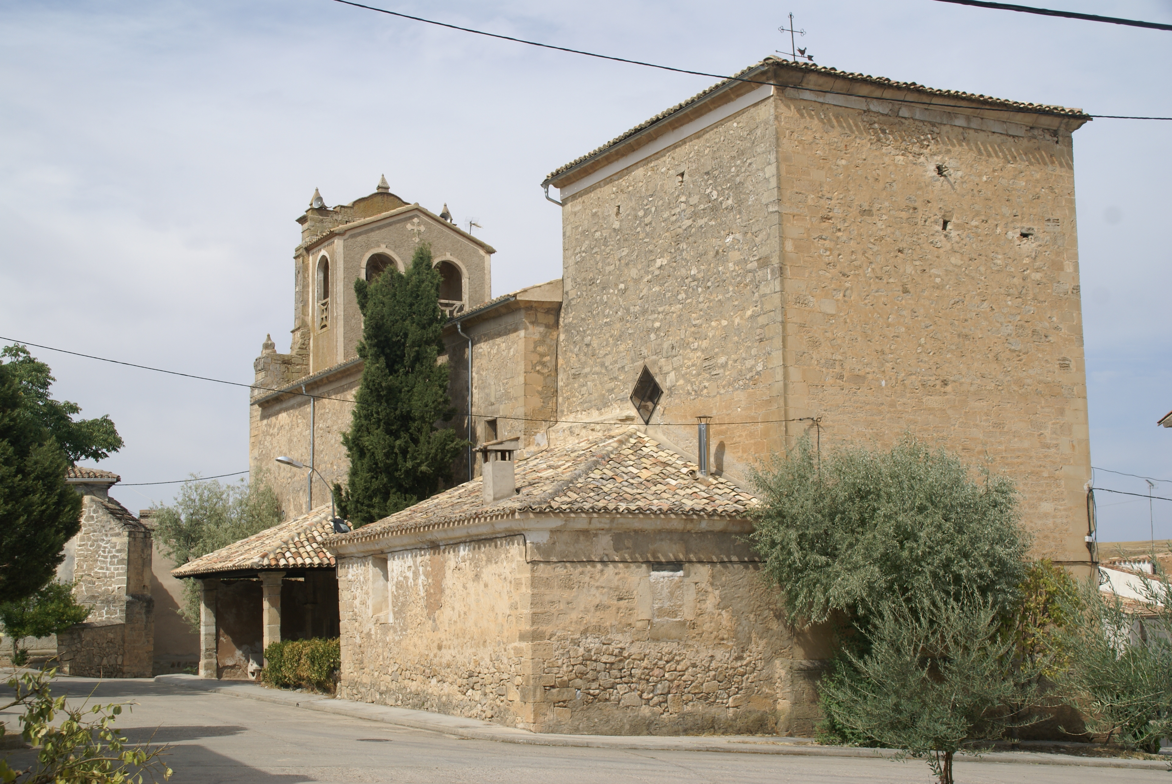 Iglesia parroquial de San Andrés Apóstol (La Frontera,Cuenca)